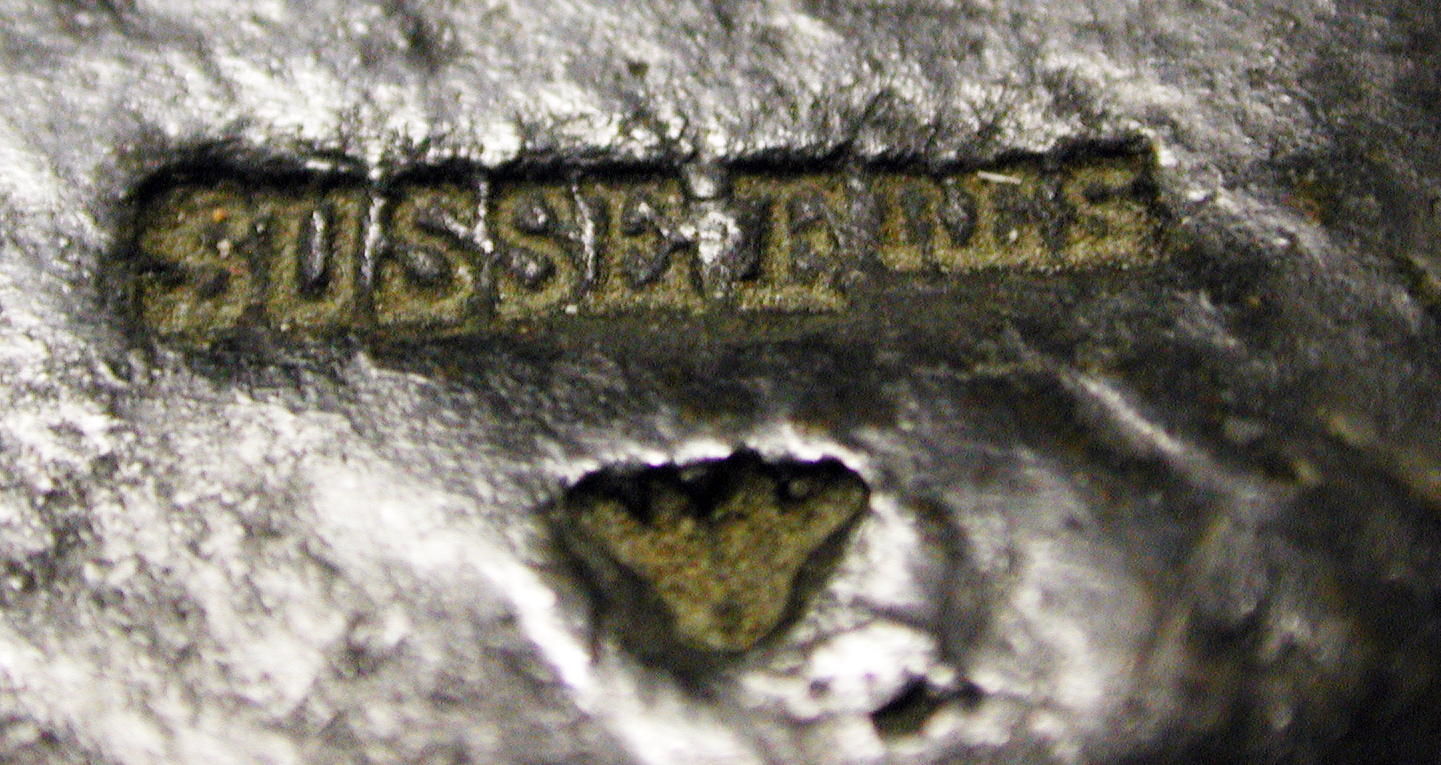 French; Statuette; Sculpture-Bronze